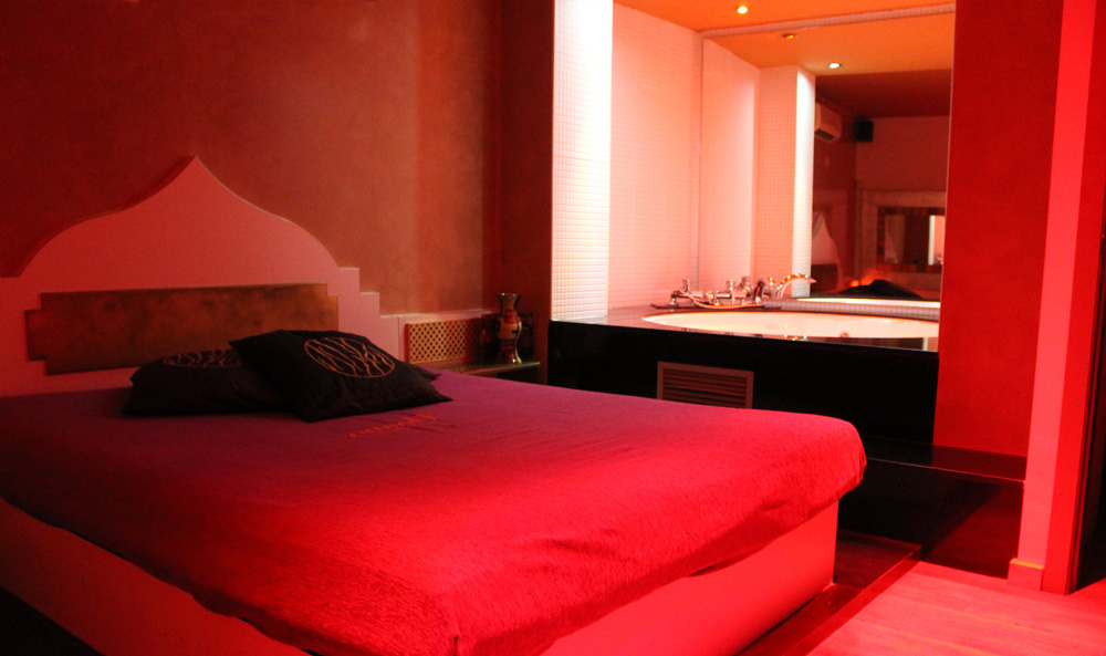 Habitación de un burdel de Barcelona